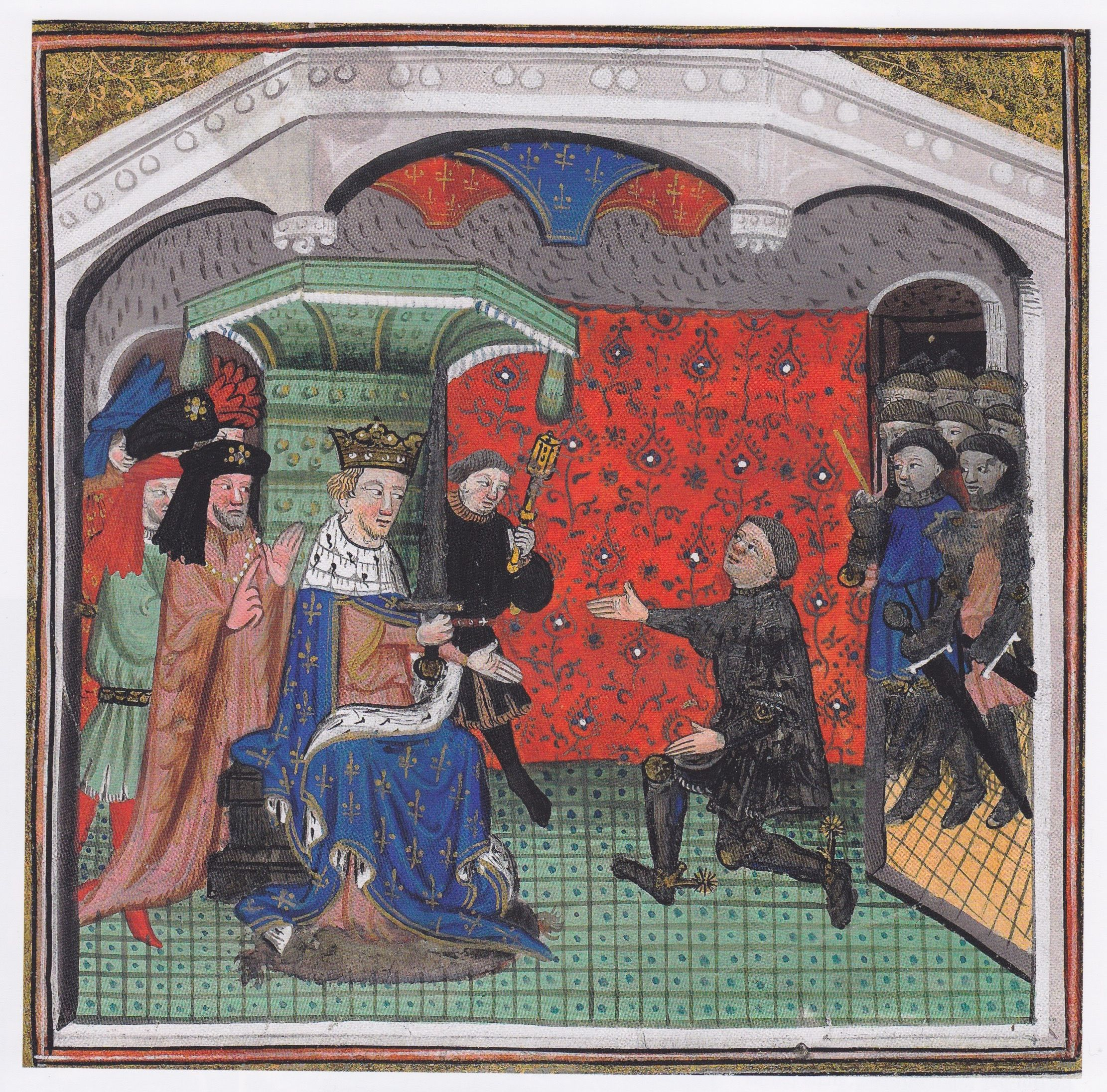 Du Guesclin nommé connétable, enluminure extraite de la Chronique de Bertrand du Guesclin.